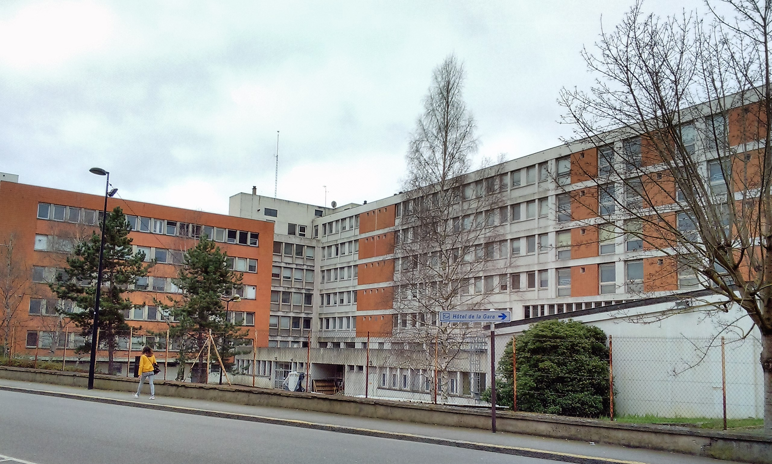 Friche de l'ancien hôpital au centre de la ville d'Evreux